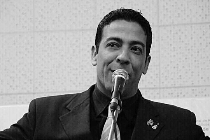 Poeta Argentino